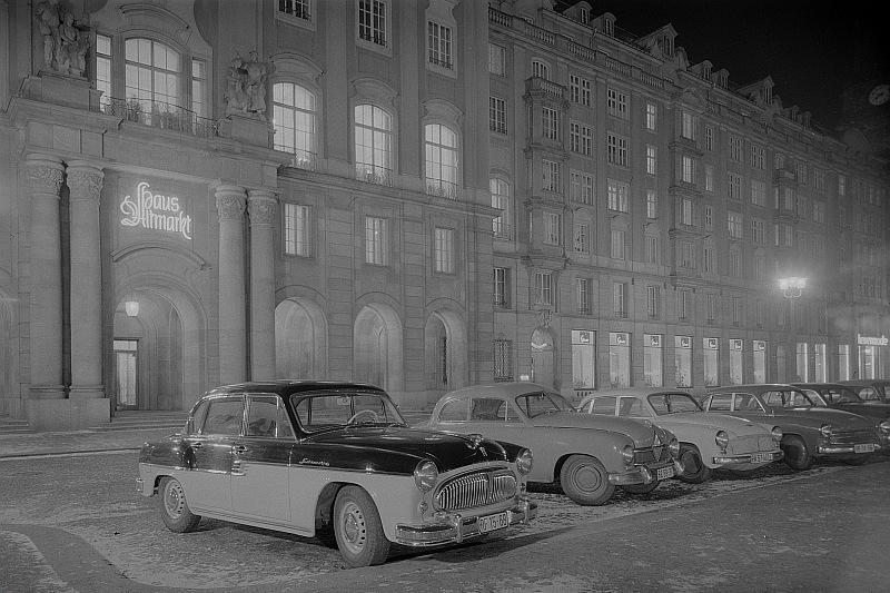 Original image description from the Deutsche FotothekDresden. Haus Altmarkt mit parkenden Autos